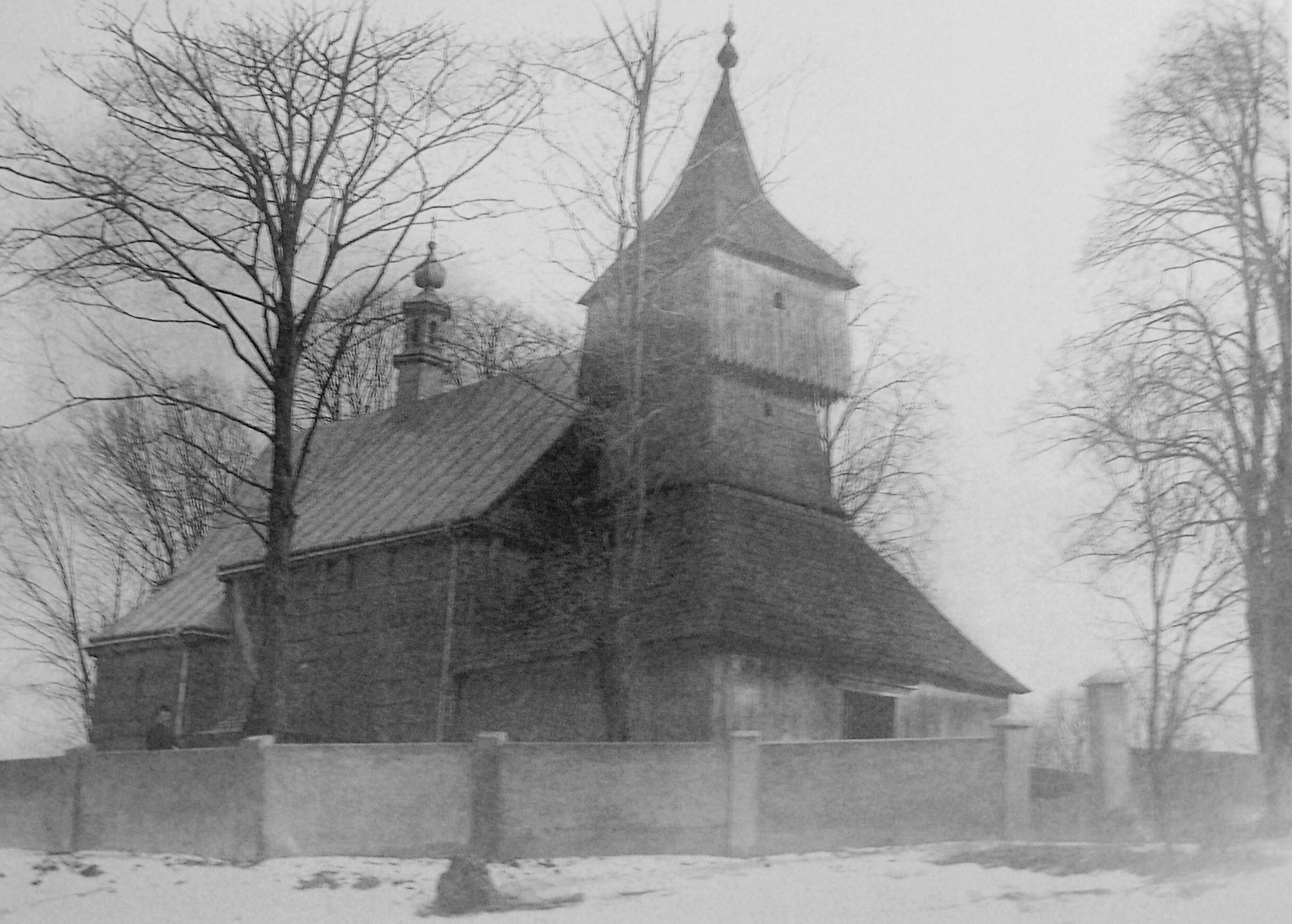 Drewniany kościół św. Mikołaja z Bączala Dolnego, obecnie w MBL w Sanoku